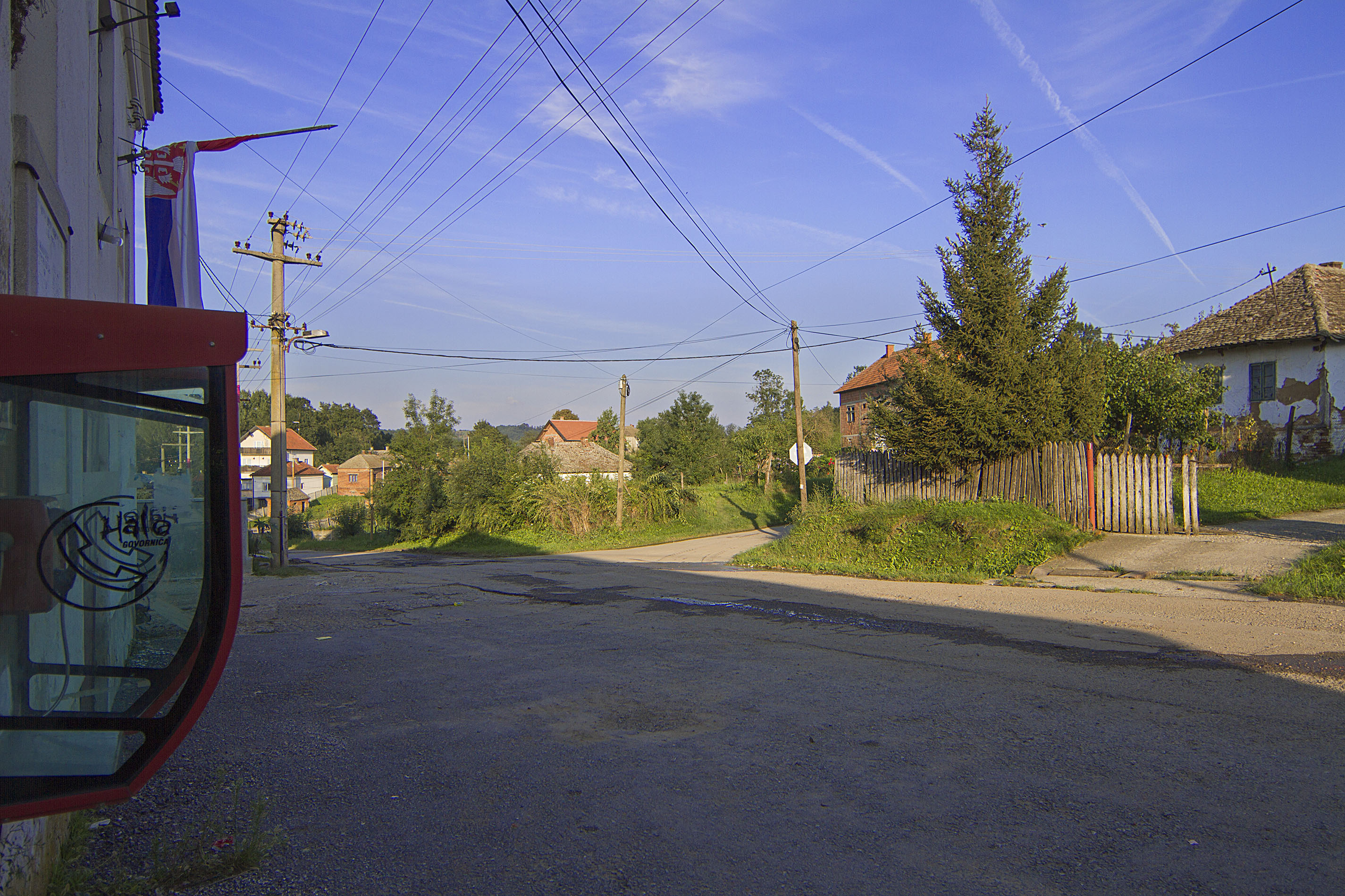 Камендол, центар